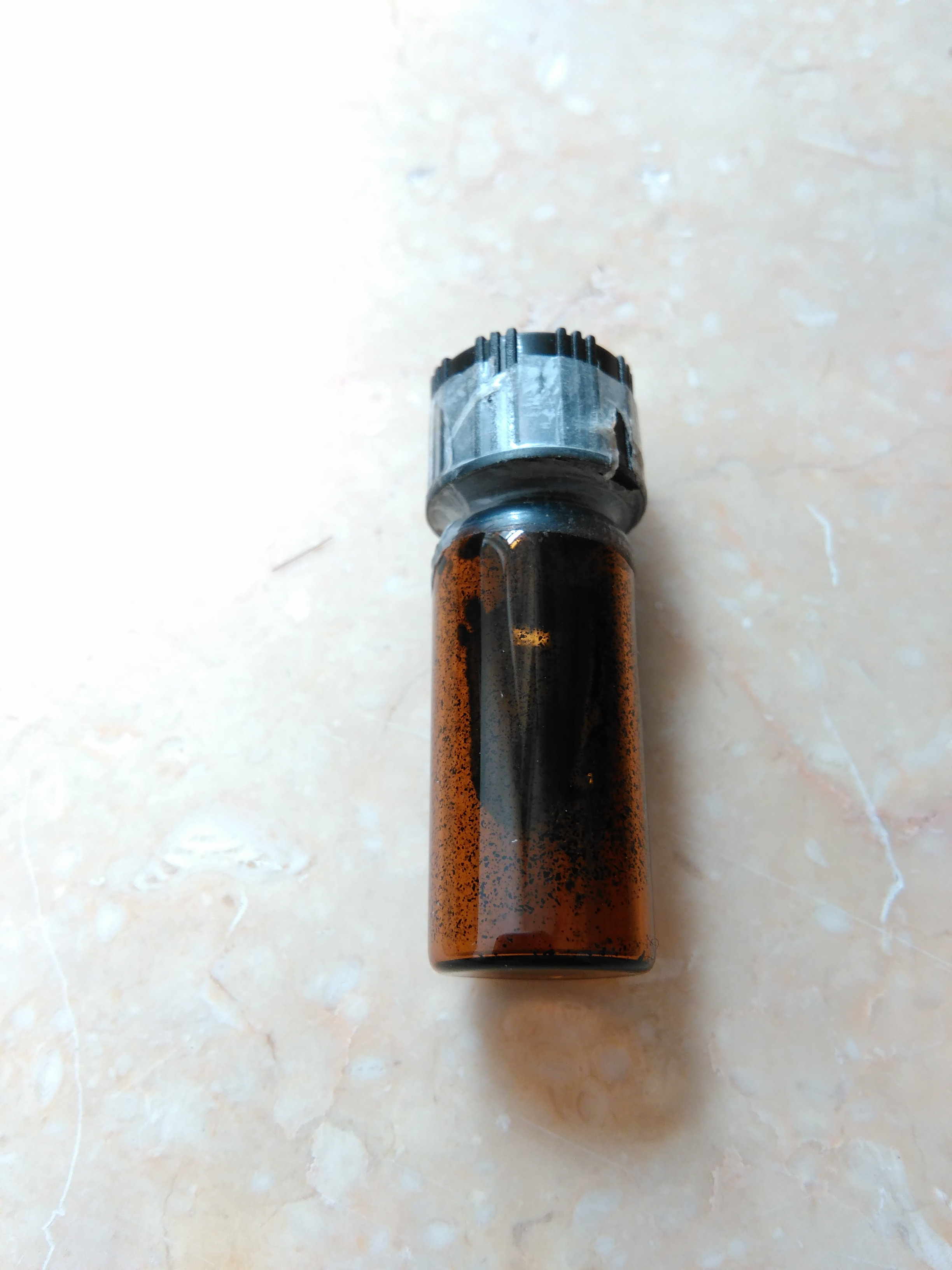 四正丙基高钌酸铵，97%，250mg，CAS 114615-82-6。